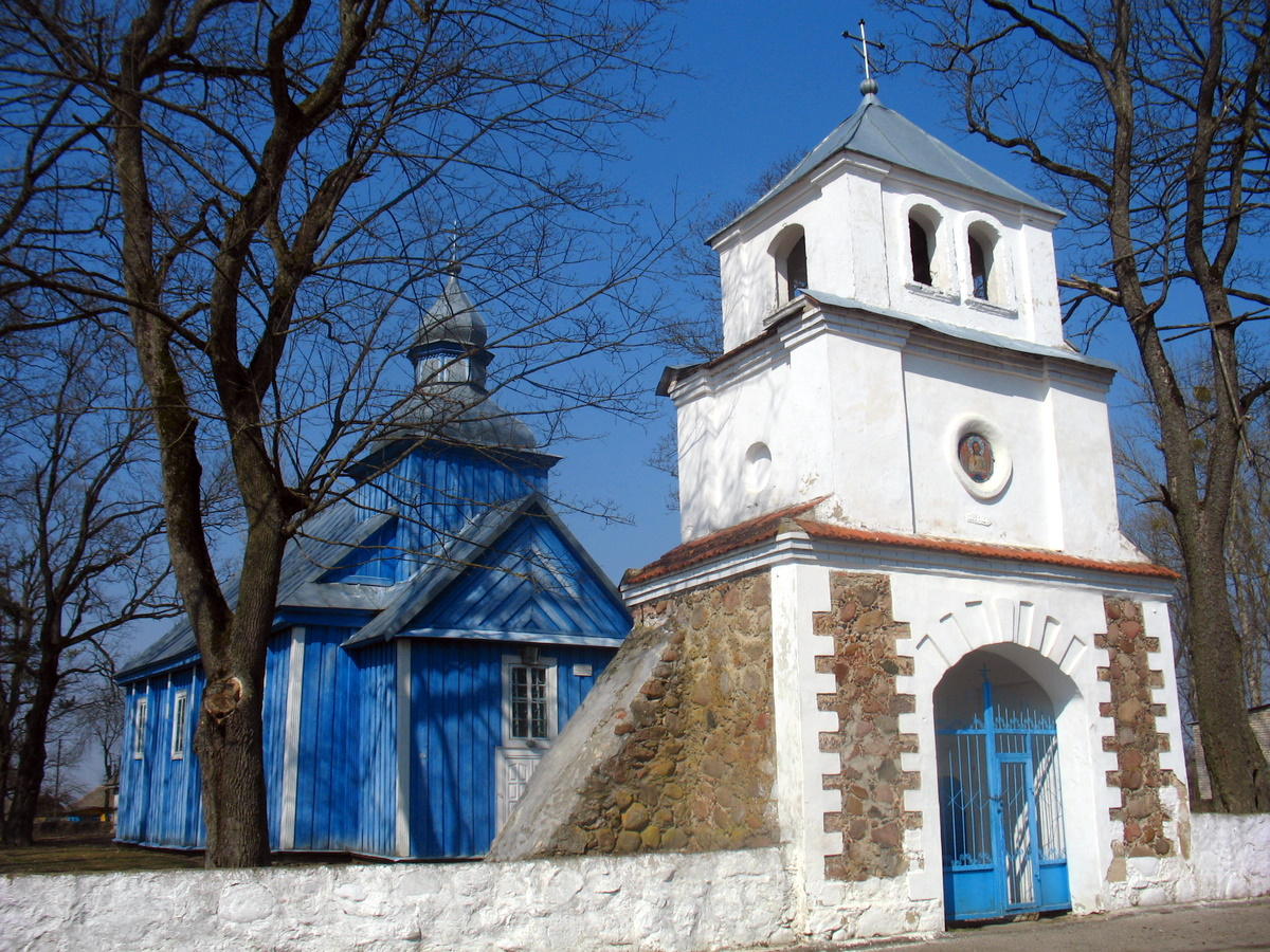 Беларуская (тарашкевіца): Бялавічы